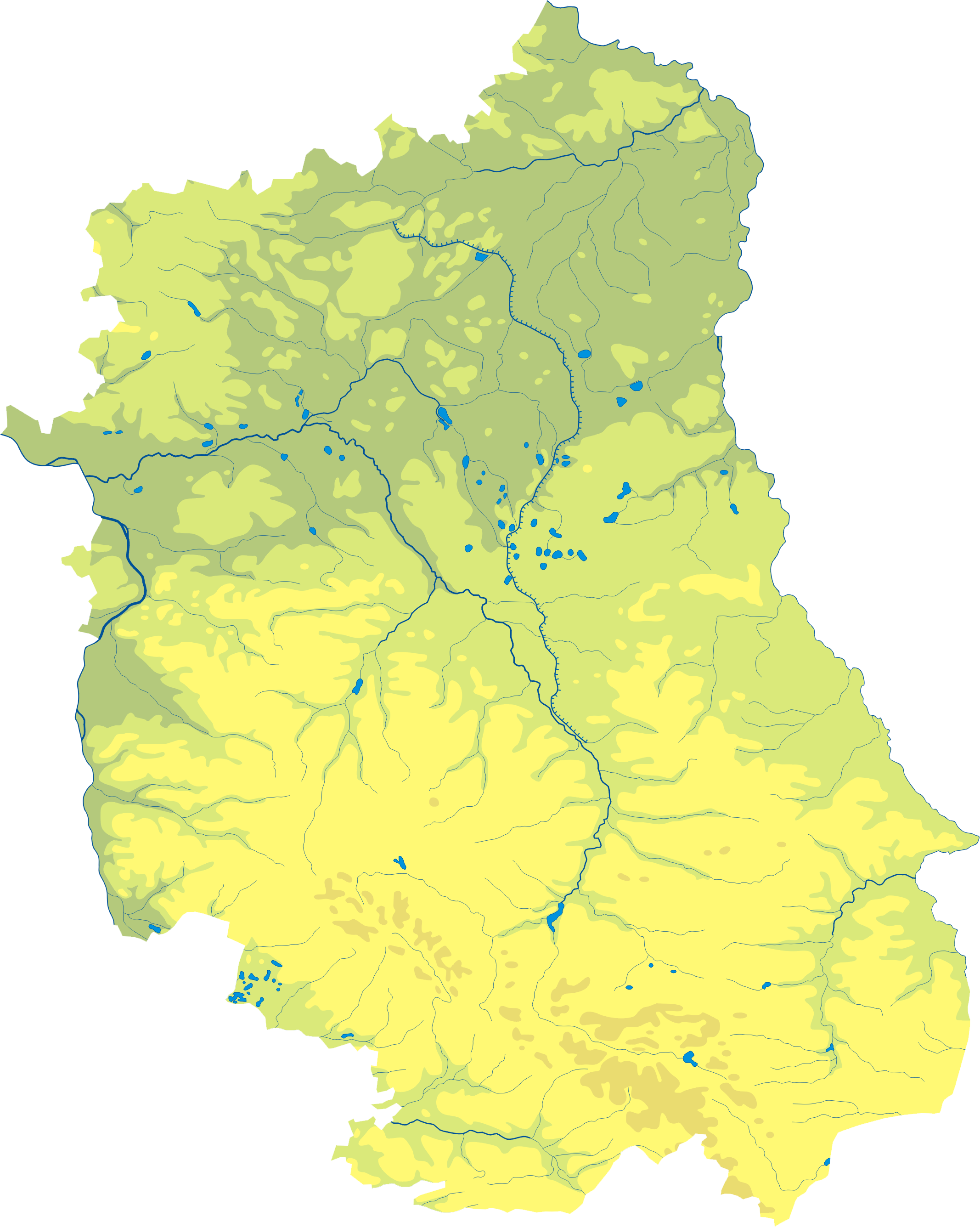 Mapa wód i ukształtowania powierzchni województwa lubelskiego. Autor: AotearoaWspółrzędne graniczne mapy: N: 52.2878° N S: 50.2519° N W: 21.6157° E E: 24.1458° E Legenda